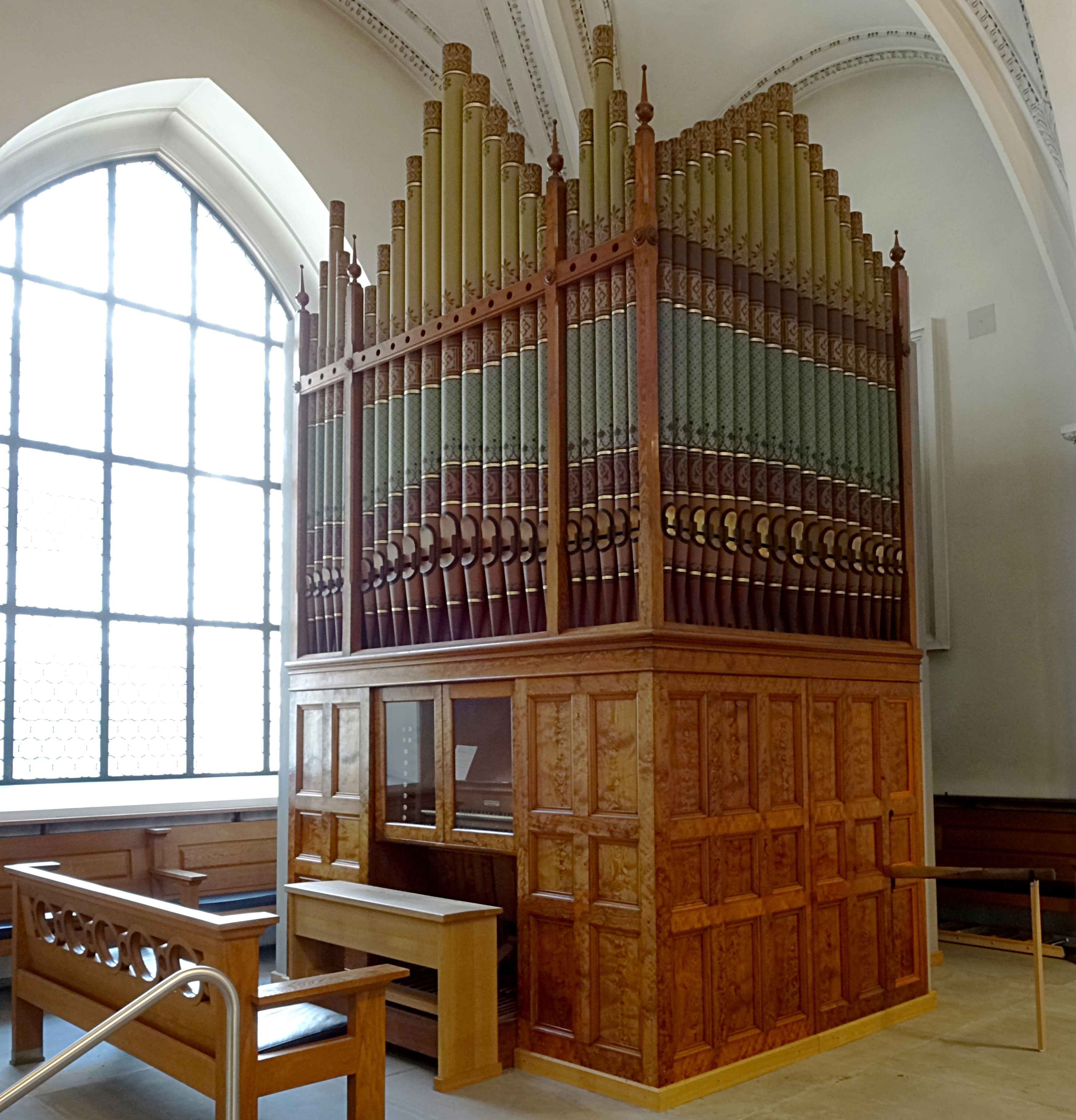 Chororgel von James Conacher (1886 Huddersfield GB) in der Predigerkirche in Zürich